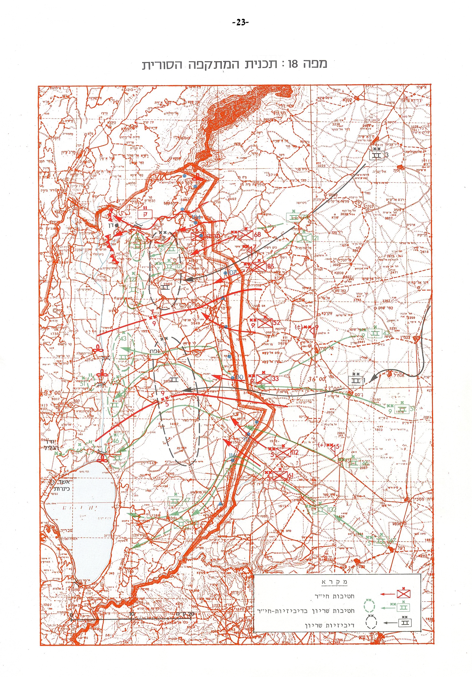 מפה 18 - תוכנית המתקפה הסורית - מלחמת יום הכיפורים